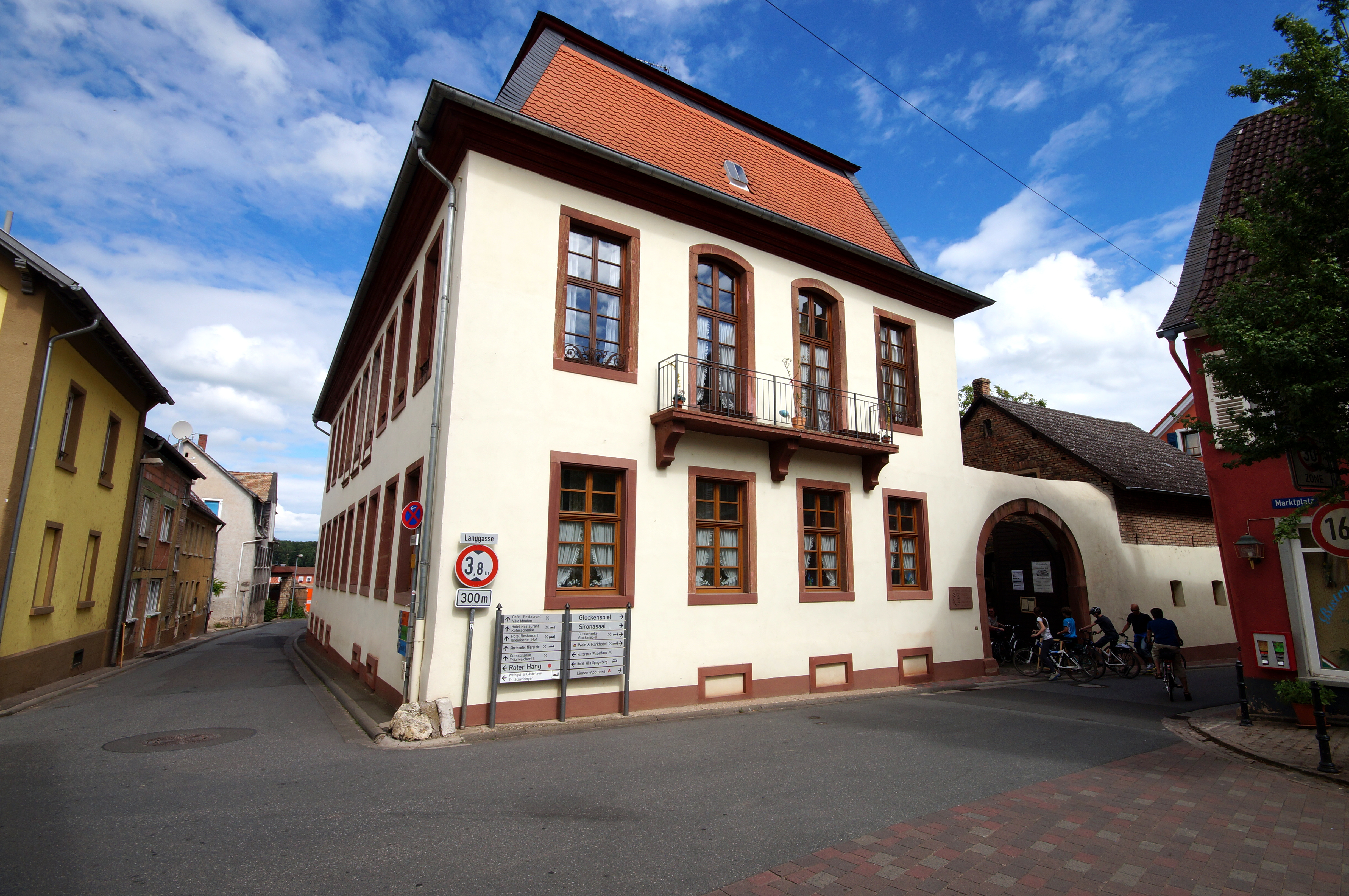 Denkmalgeschütztes Gebäude des Haxthäuser Hofs in der Langgasse 35 in Nierstein